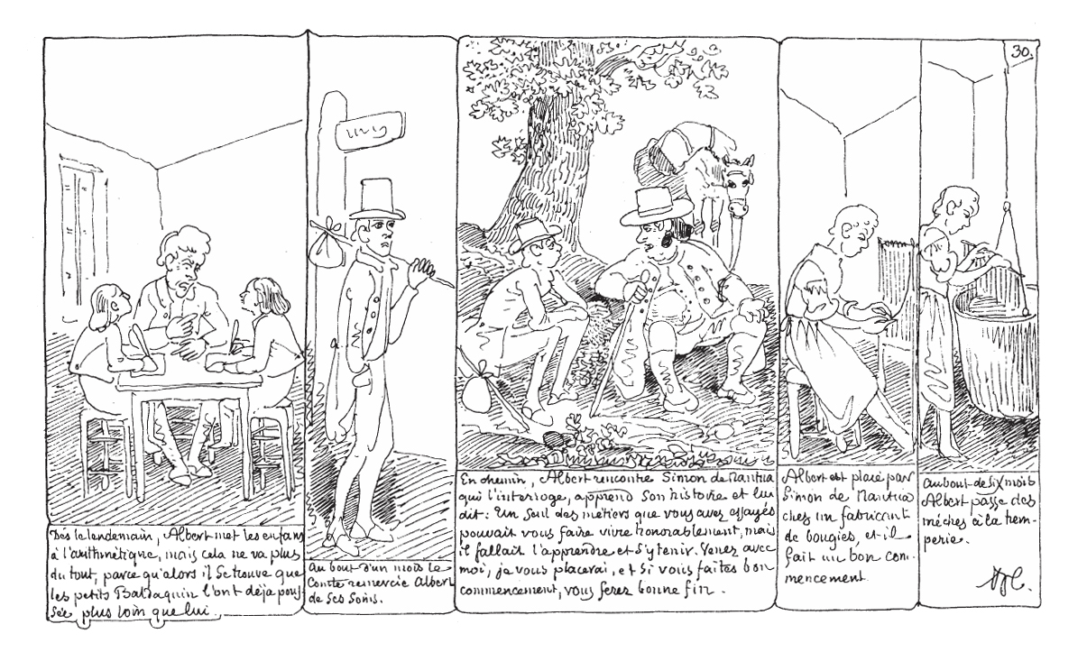 Page 30 d'Histoire d'Albert